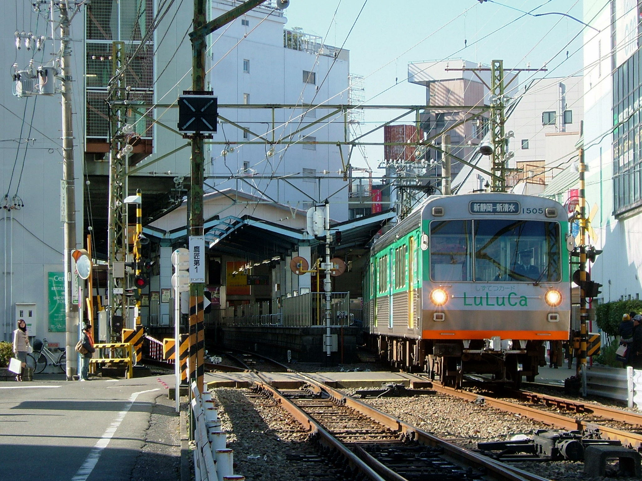 新静岡駅を出発する静鉄1000系